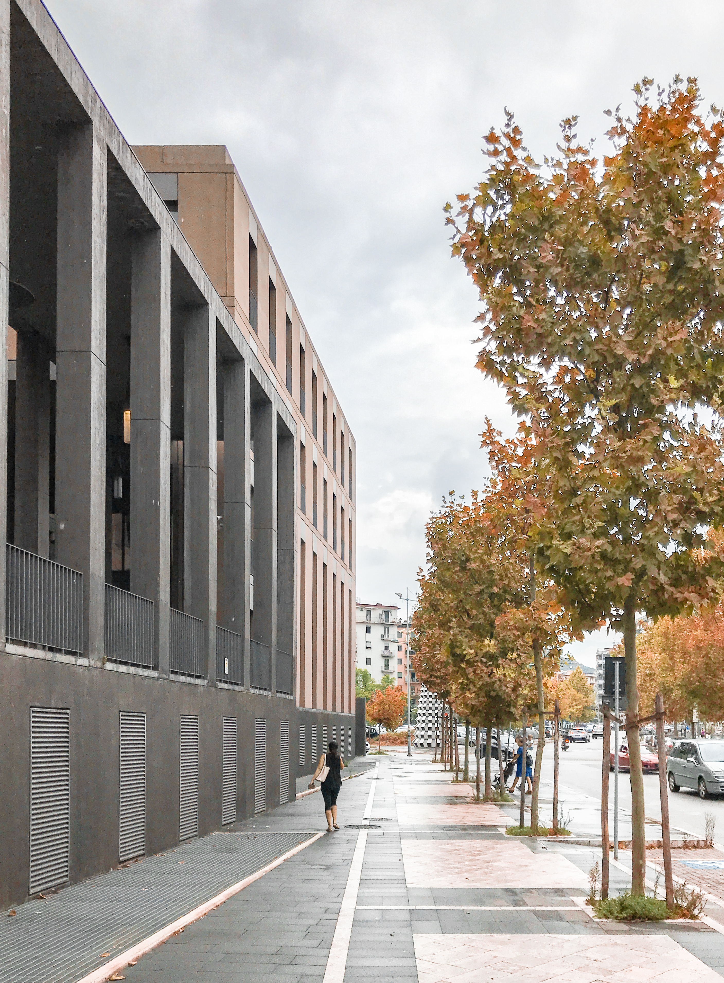 Vista dell'area esterna alla cittadella